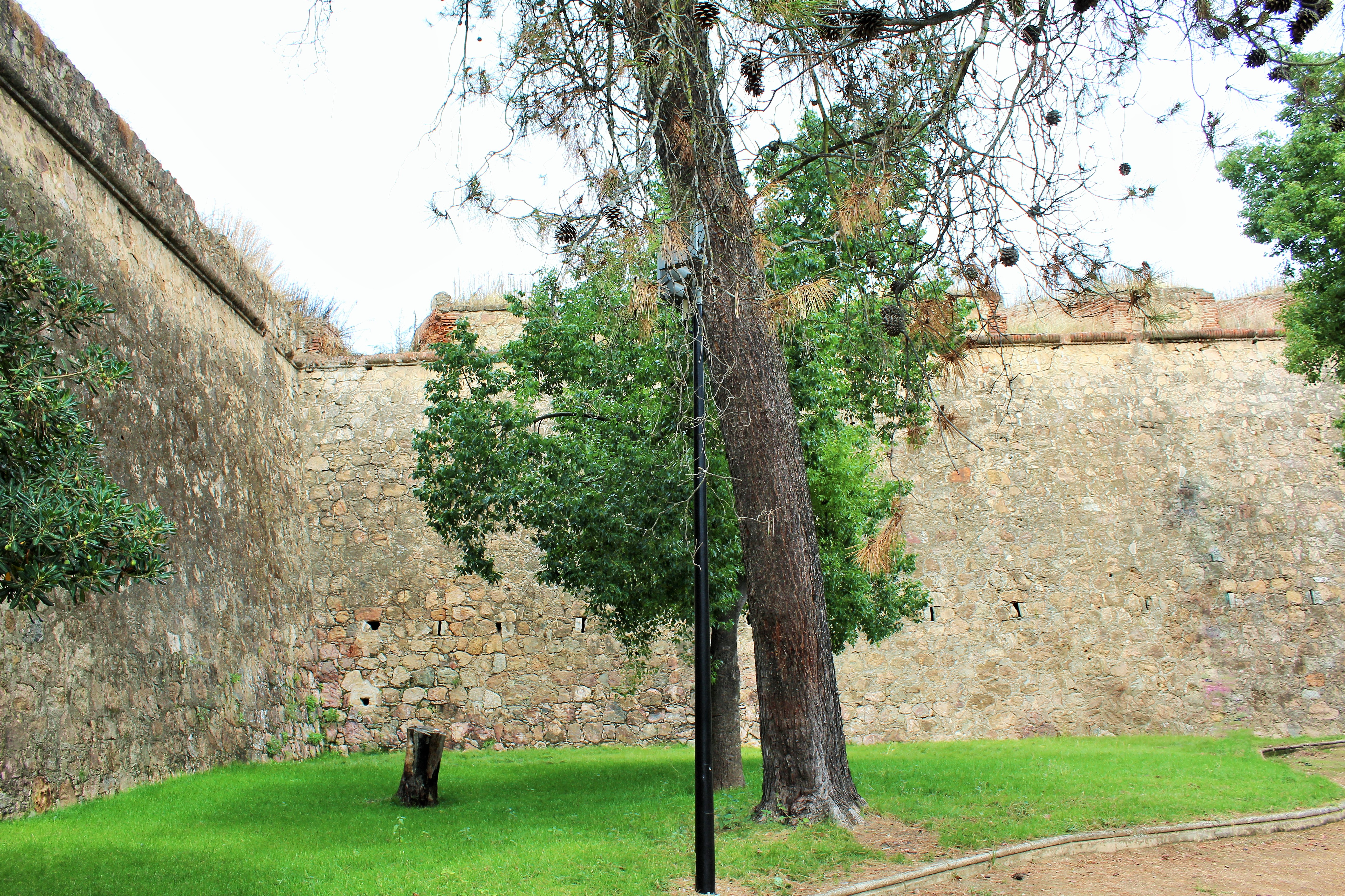 Lienzos en ángulo con troneras y aspilleras.